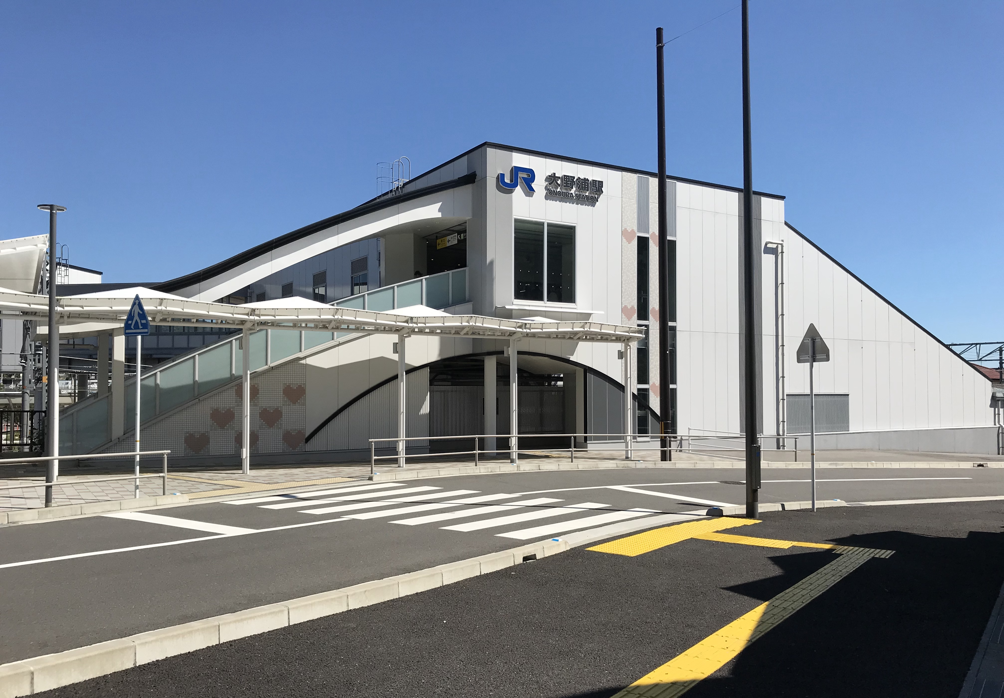 JR西日本山陽本線大野浦駅北口駅舎